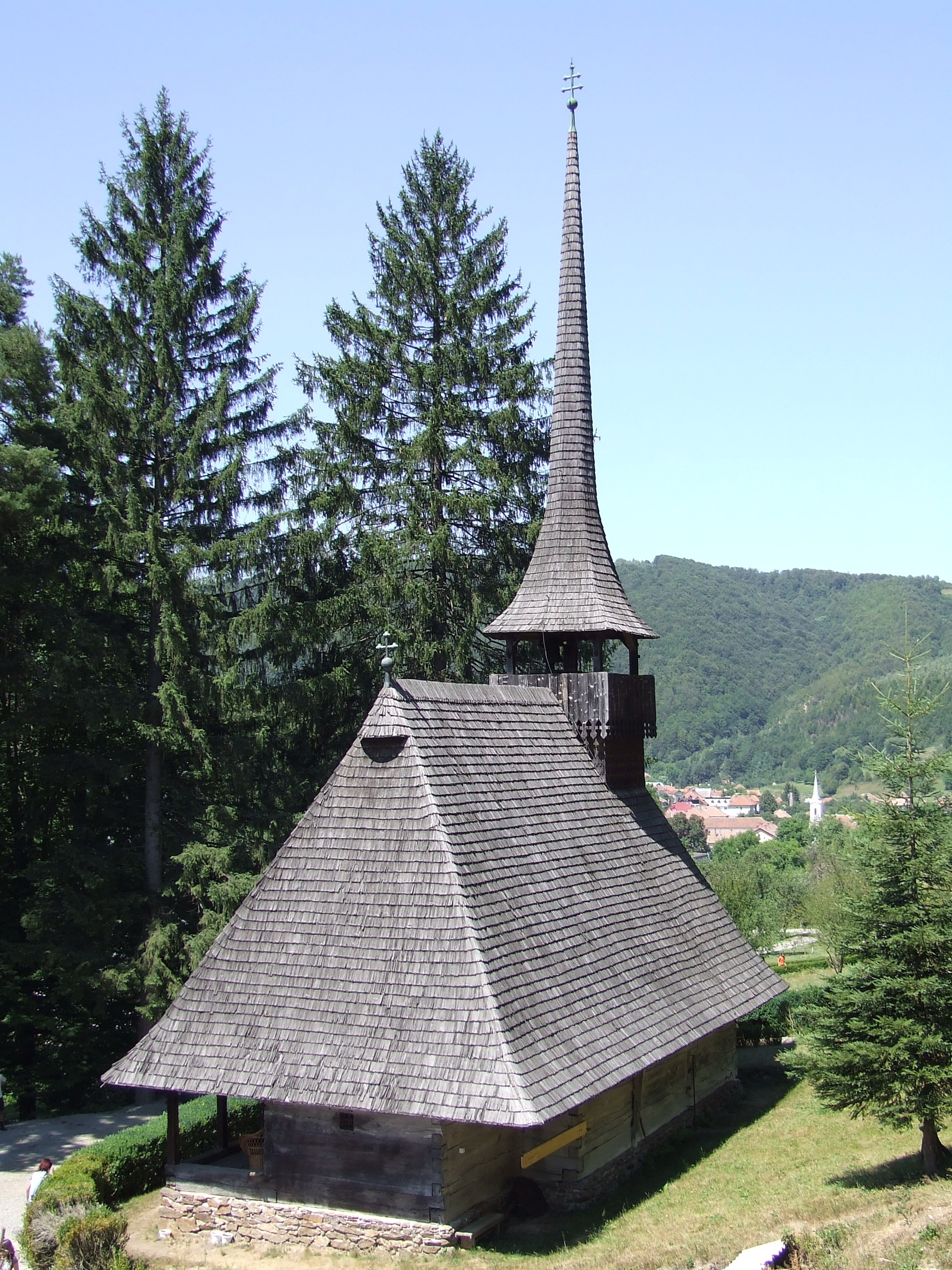 Biserica de lemn din Gălpâia 02